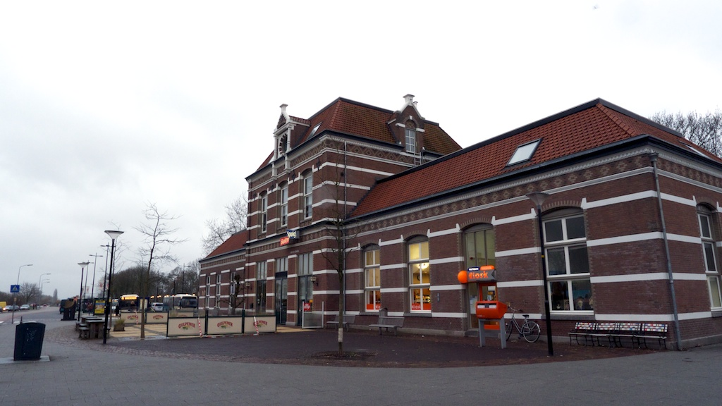 Station Tiel anno 2011